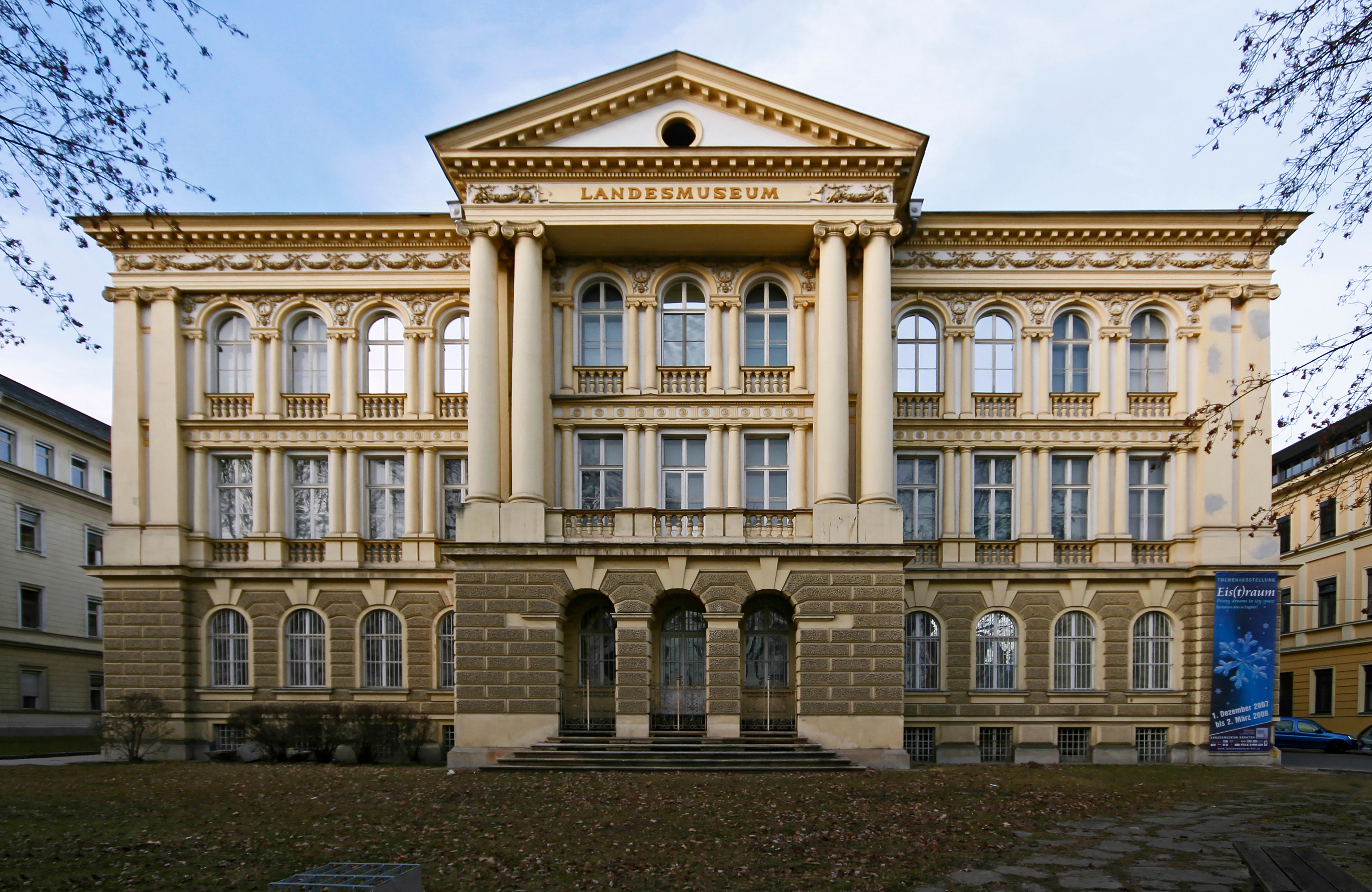 Landesmuseum für Kärnten, Klagenfurt, Österreich.